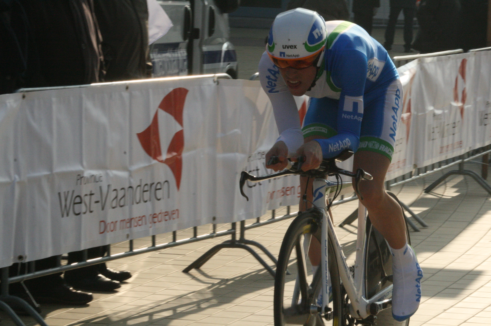 Driedaagse van West-Vlaanderen 2011, proloog in Middelkerke